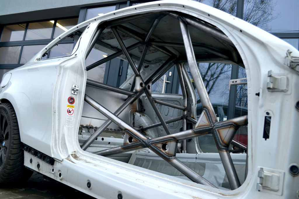 Klatka bezpieczeństwa Scheffler Safety Cages w BMW 1